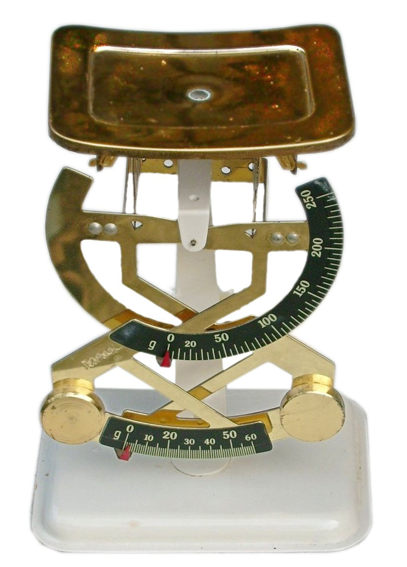 Briefwaage